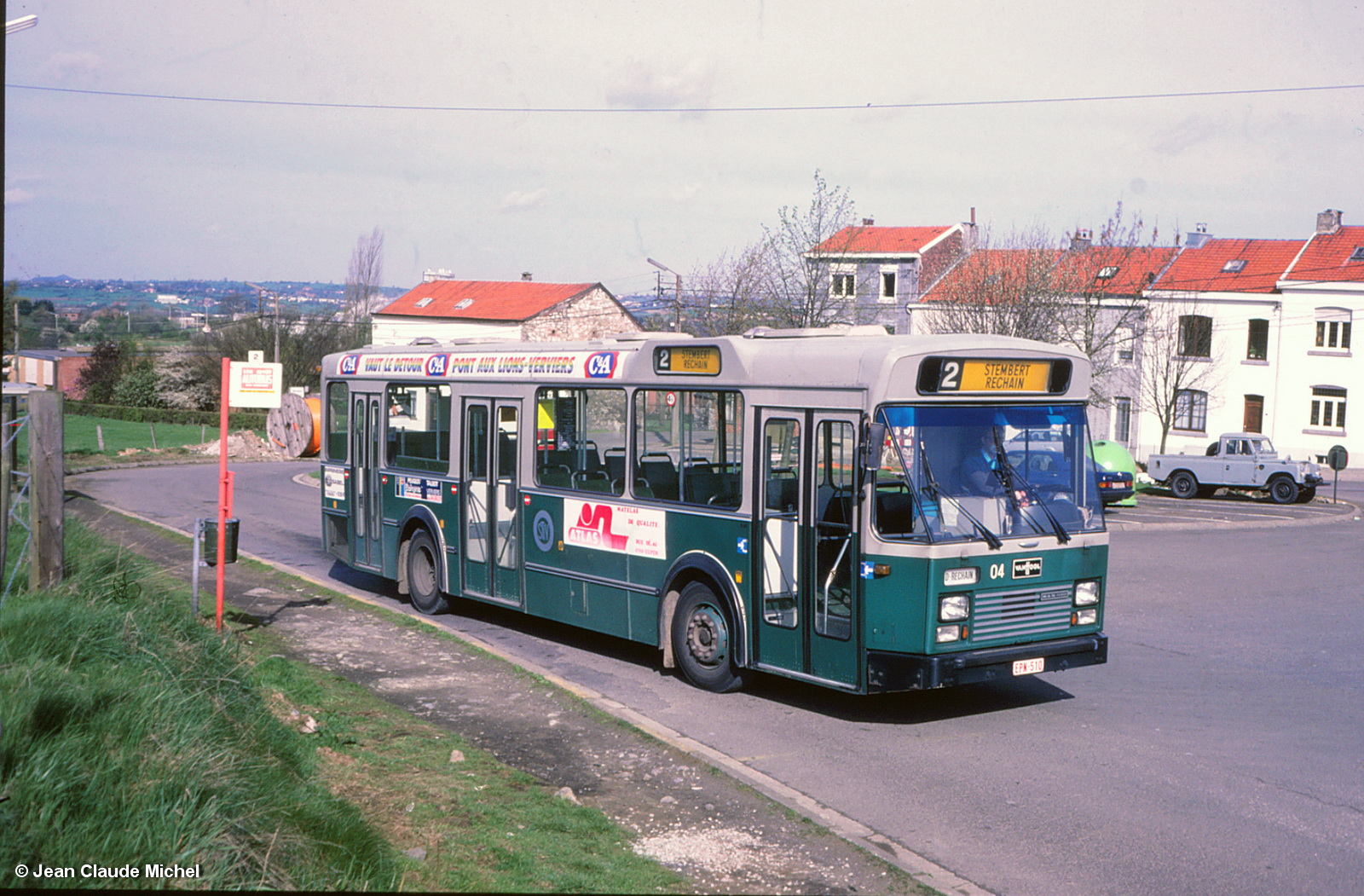 Autobus Van Hool A120/50 de la STIV n°04 (série 01-30) sur la ligne 2, rue du Cimetière à Stembert